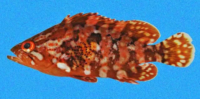 Alphestes immaculatus